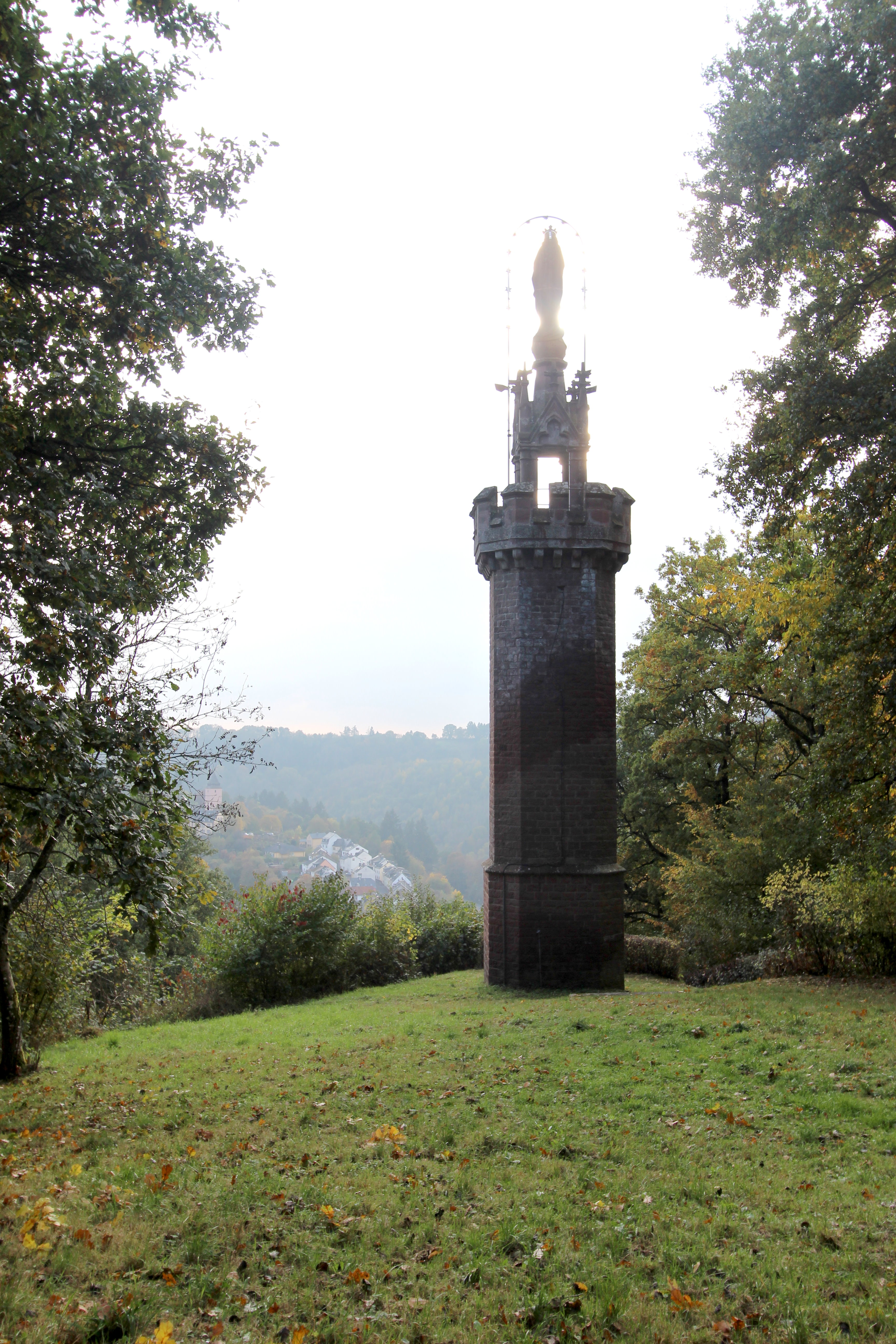 54655 Kyllburg. Mariensäule; neugotisch, Rotsandstein, 1866, Maurermeister Jakob Kronibus aus Kyllburg, Marienskulptur von Peter Quirin. Aufnahme von 2016.